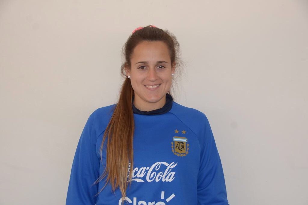 Futbolista argentina que juega en el Club Deportivo UAI Urquiza de la Primera División Femenina de Argentina.1​ y desde el 2009 forma parte de la selección Femenina de Fútbol de Argentina.